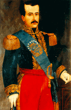 Staatsieportret José María de Urbina. President van Ecuador 1851-56.